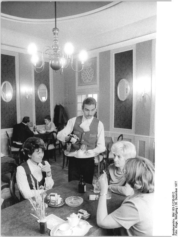 Leipzig, Weinstube ADN-ZB Kluge 30.12.77 pe Leipzig: Mit der Einrichtung der historischen Weinstube "Bachstüberl" gegenüber dem Bach-Denkmal wurde die weitere Gestaltung des Thomaskirchhofes als touristischer Anziehungspunkt fortgesetzt. Wie zu Lebzeiten Bachs können die Besucher in der gemütlichen Gaststätte Schoppenweine trinken und ein deftiges Schinken- oder Käsebrot verzehren.